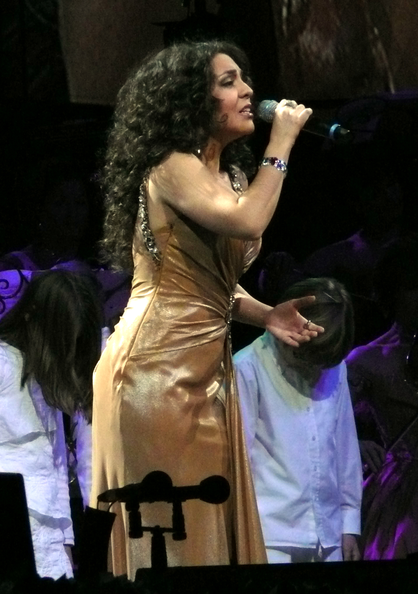 Opernsängerin Carmen Monarcha am 2. Januar2010 in Köln)